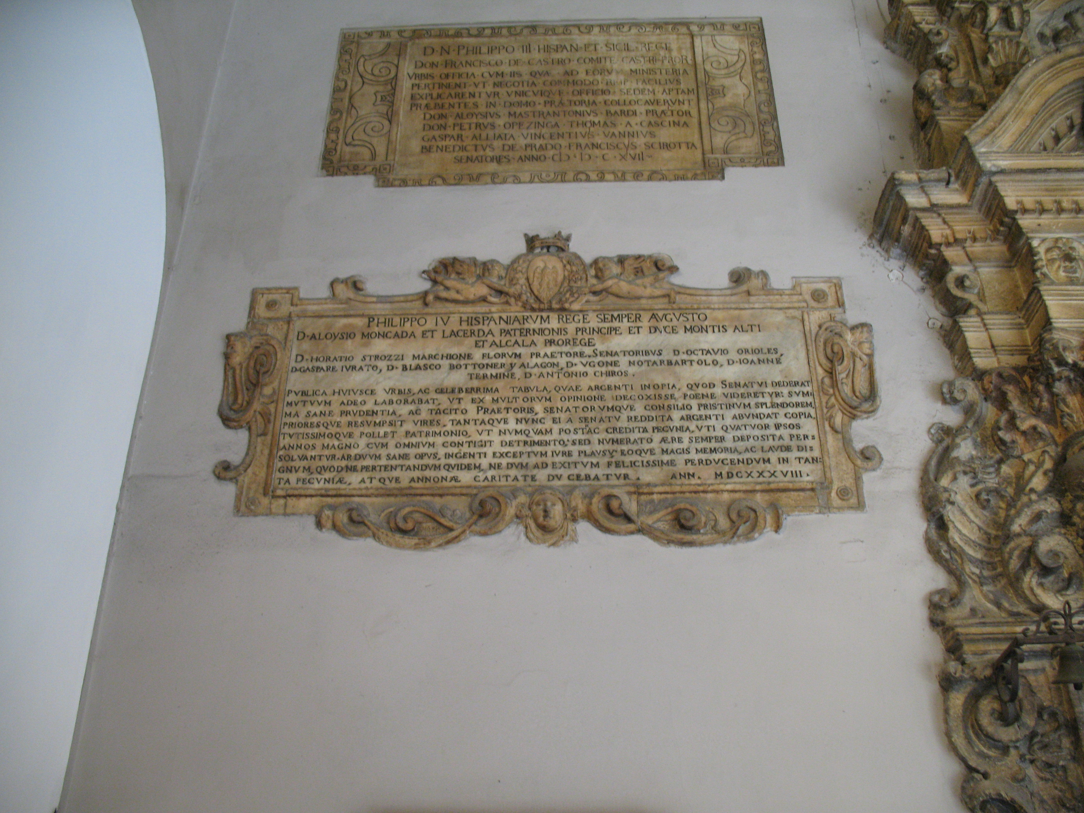 Interno del Palazzo Pretorio di Palermo, lapidi.